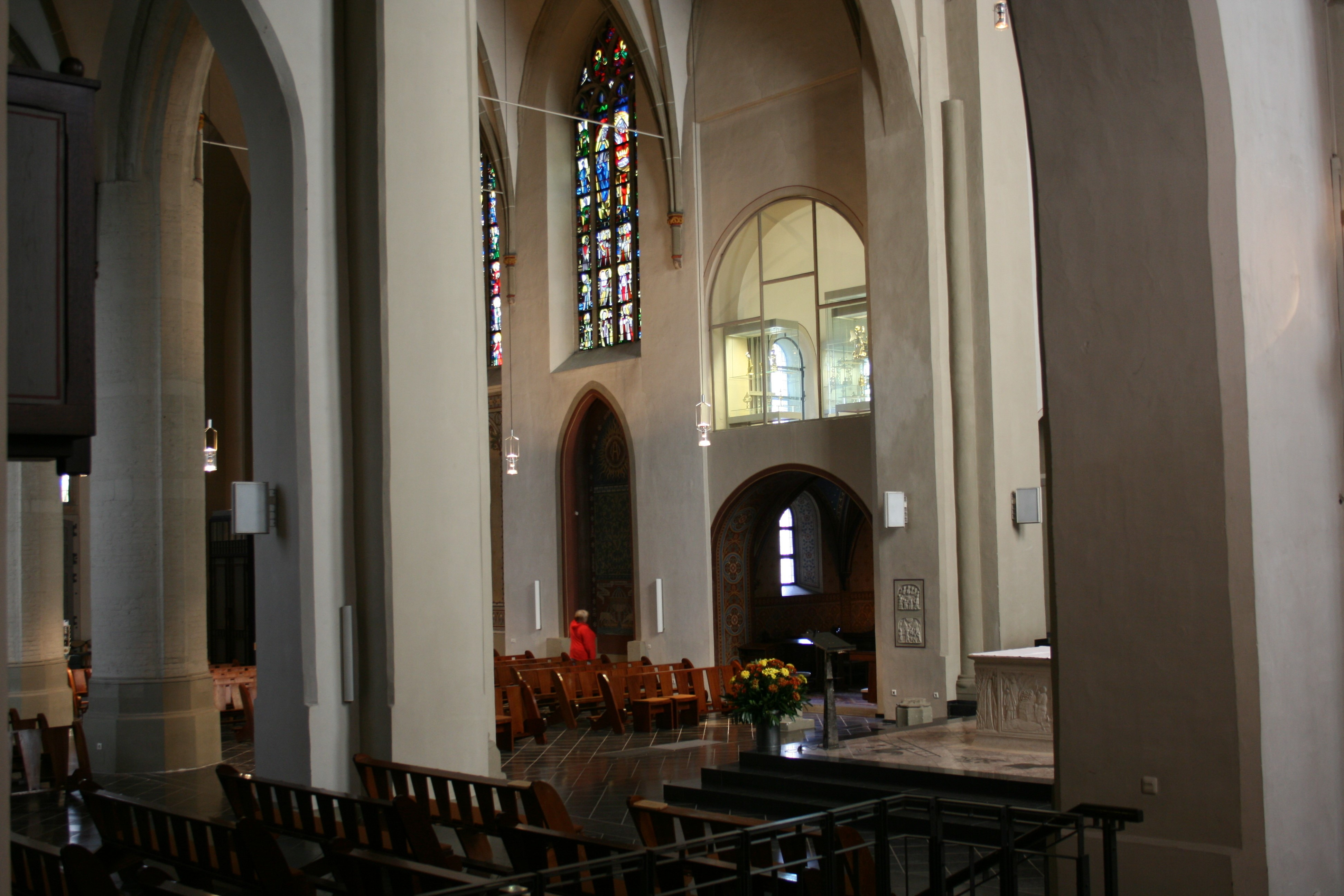 Sankt Martini in Emmerich am Rhein